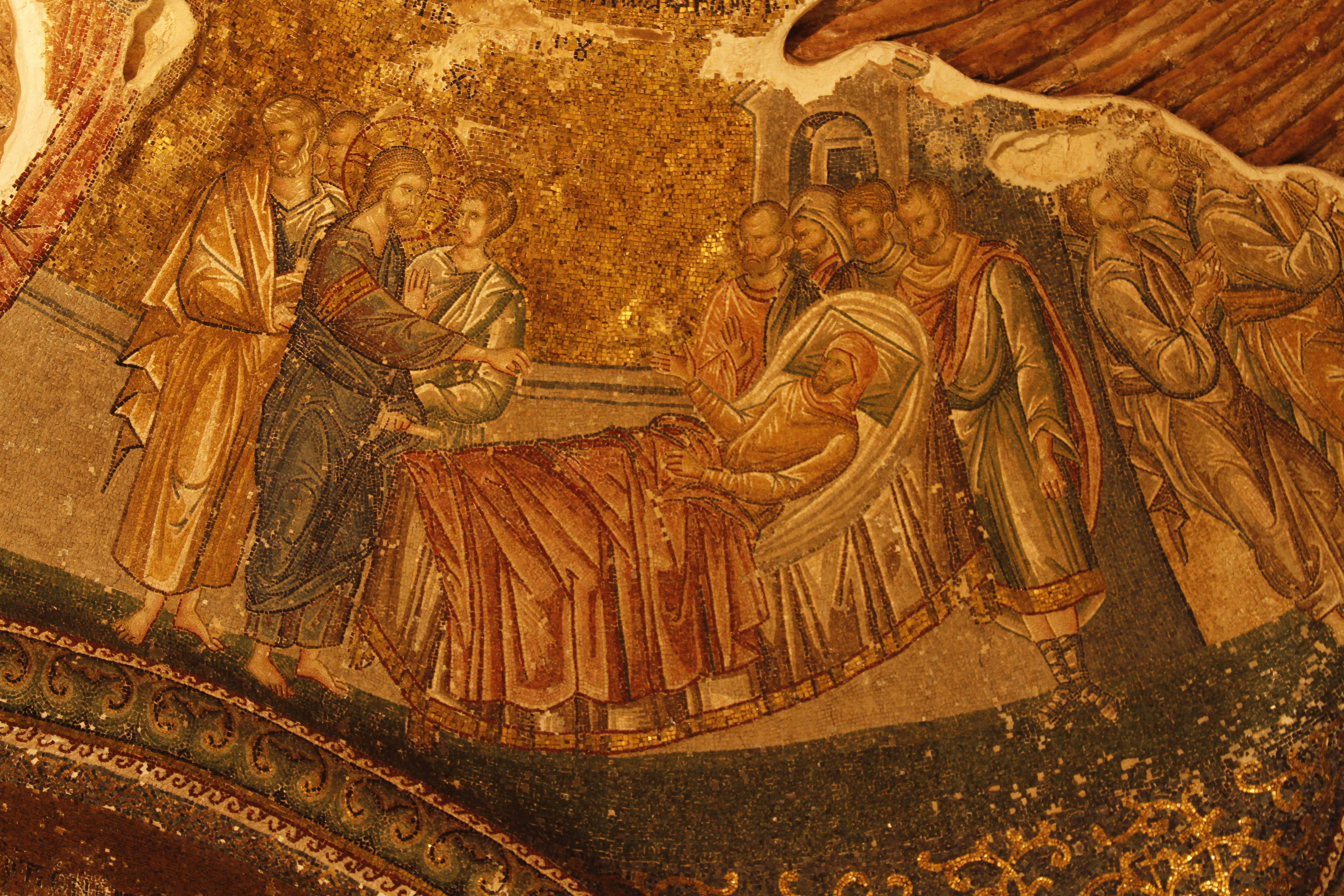 Milagre da "cura do paralítico em Cafarnaum" (Mateus 9:1-8;Marcos 2:1-12; Lucas 5:17-26).